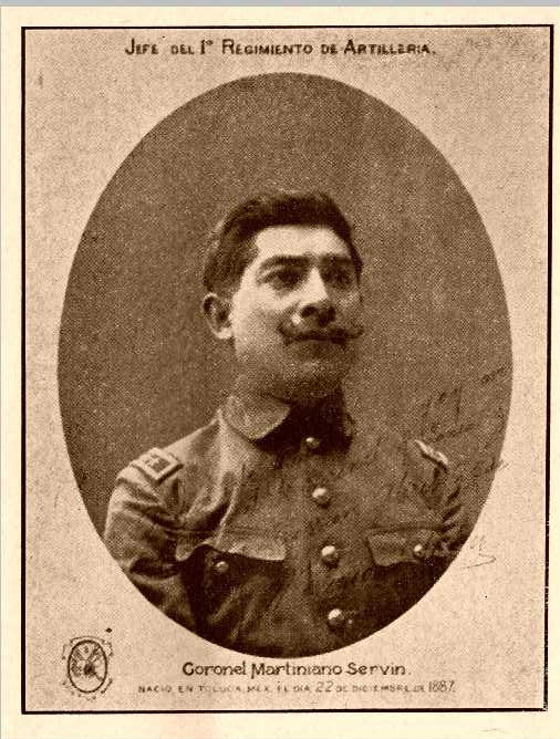 General Martiniano Servín